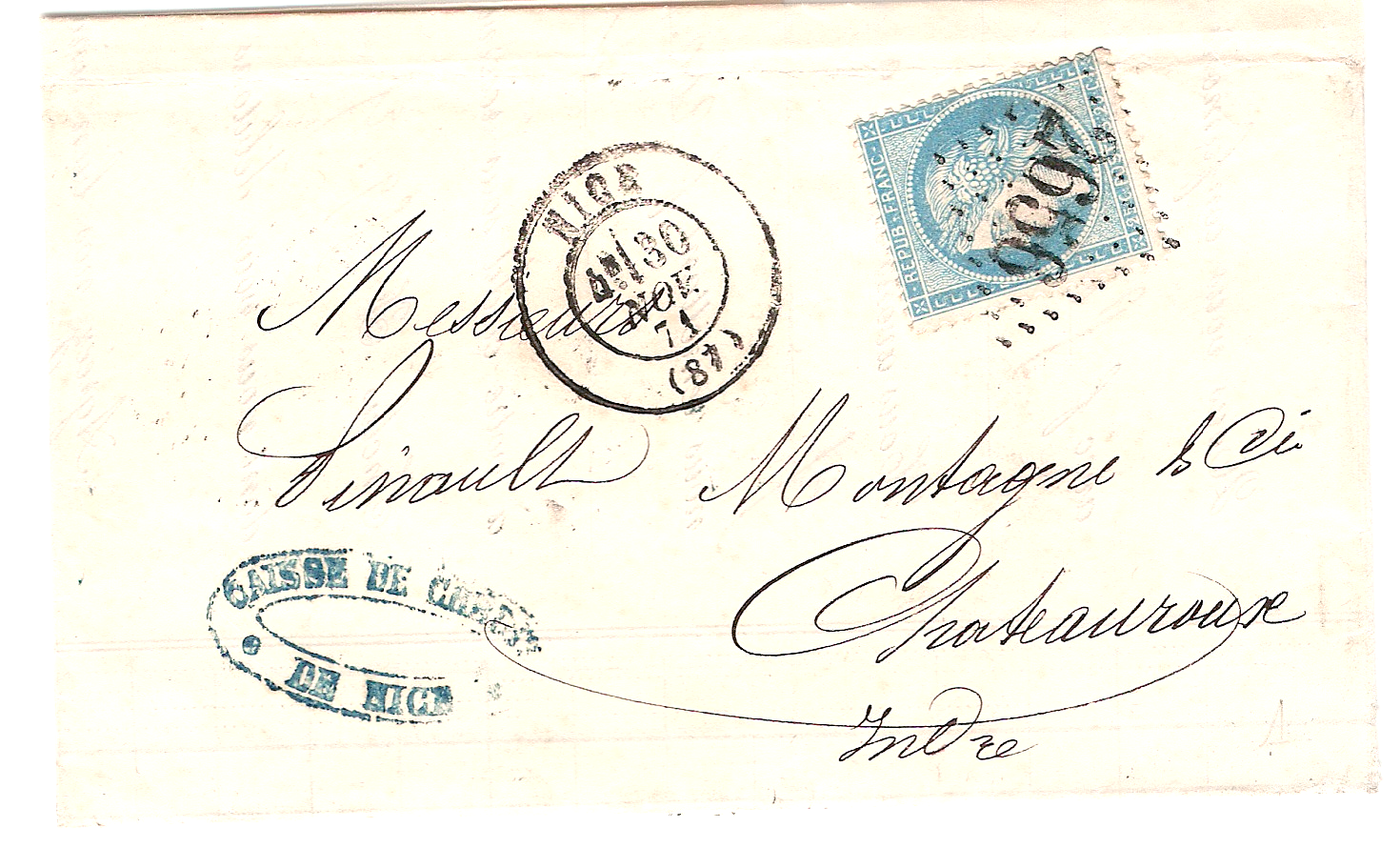 Lettre de Nice de 1871 affranchie avec un 25 c Céres type I, oblitération losage GC 2656